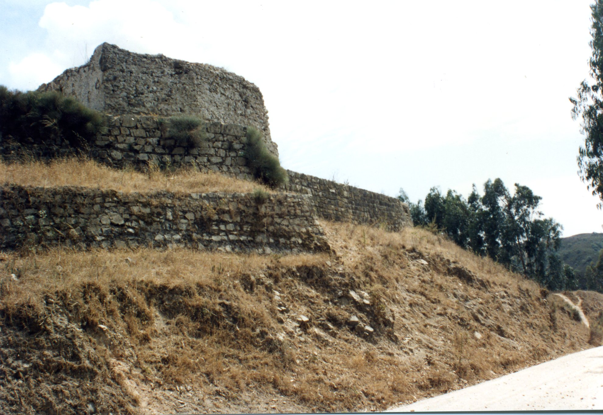 Castelo de Aljezur This file was uploaded for Wiki Loves Monuments in Portugal with the unique identifier 74149.